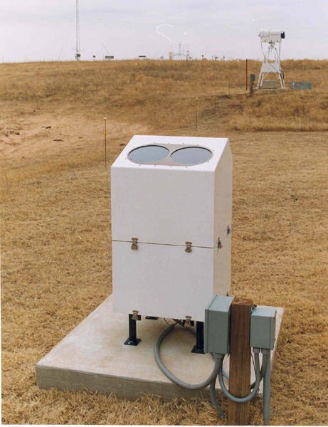 A Belfort Laser Ceilometer